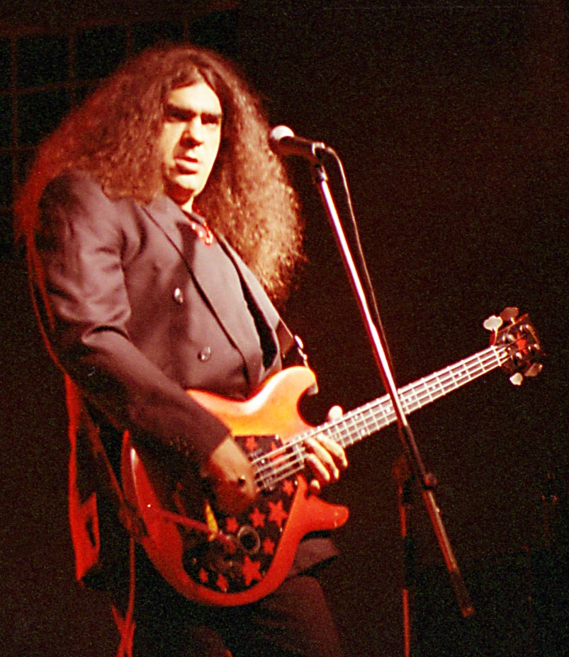 Душан Којић Која, вођа групе Дисциплина кичме, на концерту у СКЦ-у у Београду, sr:2000. Снимио Ранко Томић.